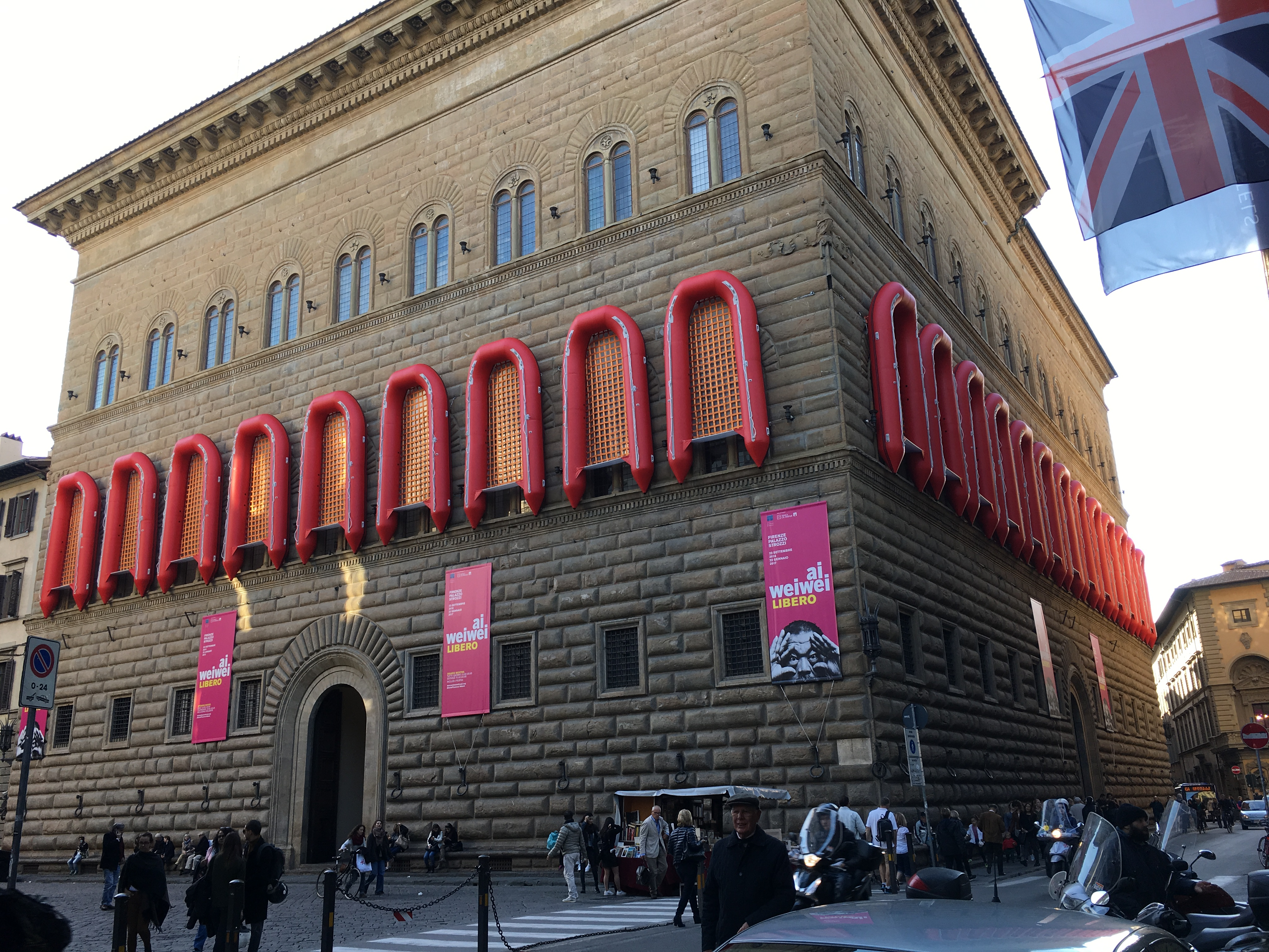 Palazzo Strozzi Firenze.Ai Weiwei